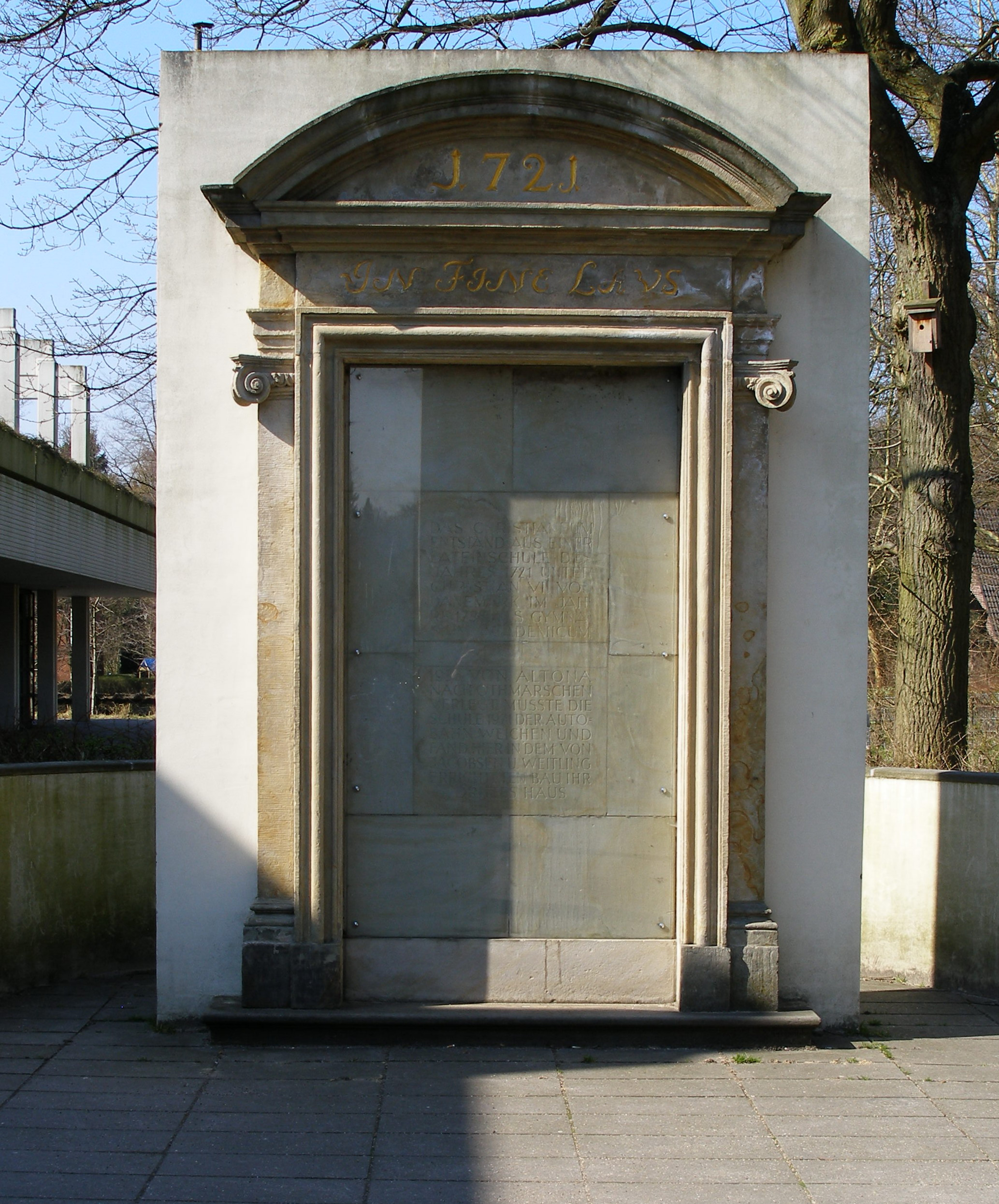 Christianeum, Hamburg; Eingangstor des ersten (zerstörten) Schulgebäudes, aufgestellt vor dem jetzigen Eingang des Christianeums.